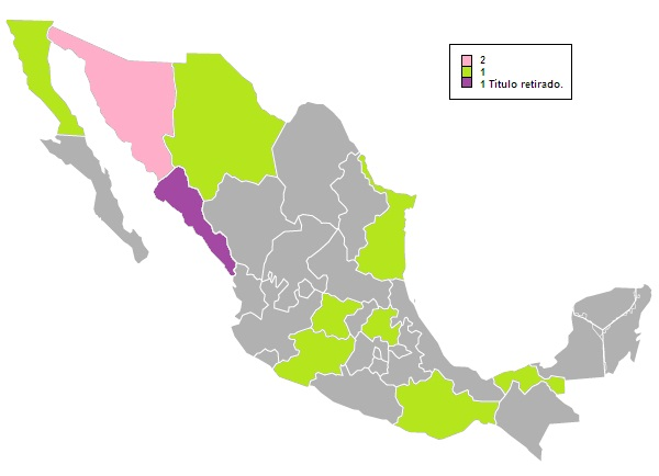 Ganadoras del título de belleza Mexicana Hispanoamericana 2018